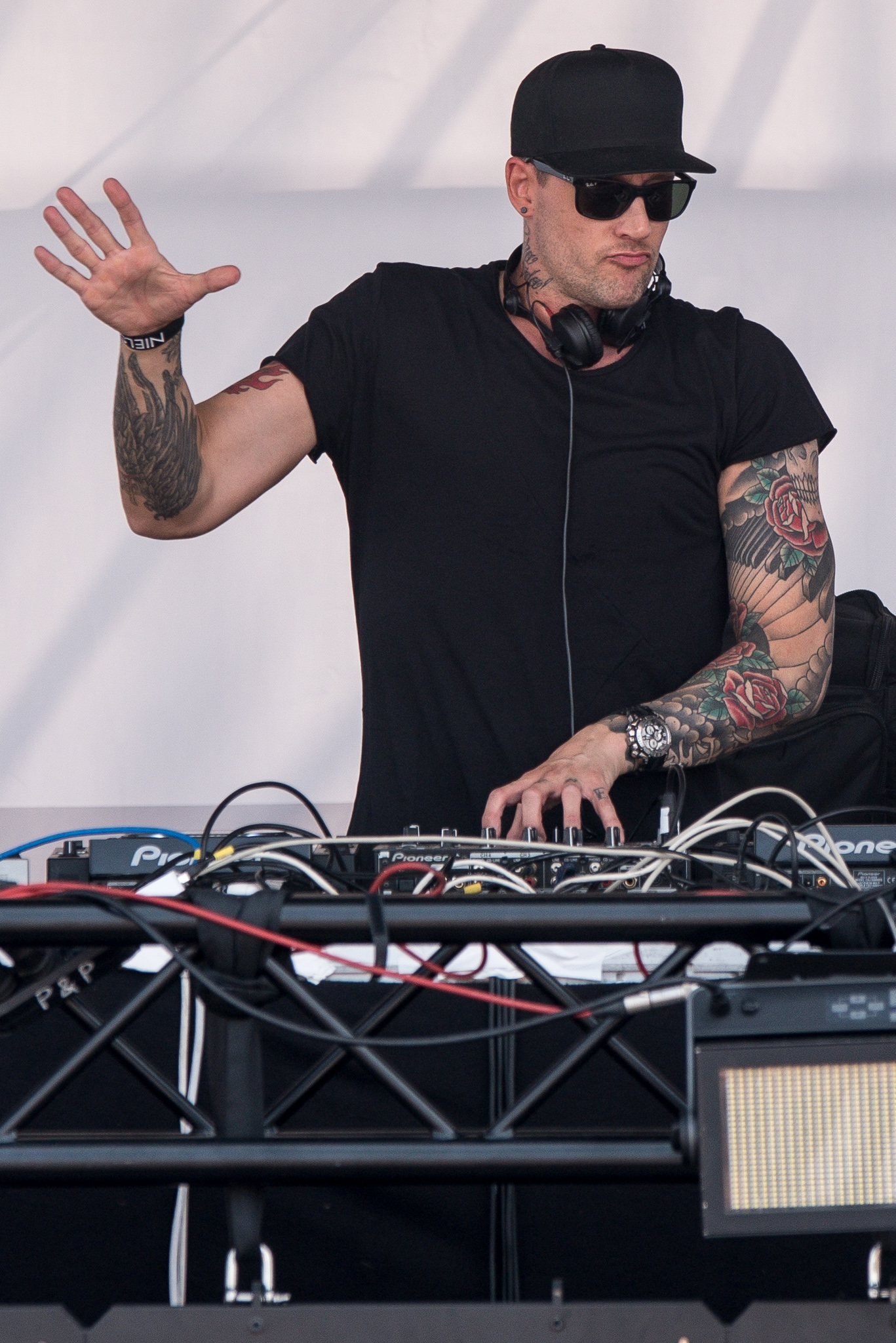 Festival,Konzert,Livekonzert,Livemusik,Mainstage,Musik,Niels van Gogh,Open Beatz 2016